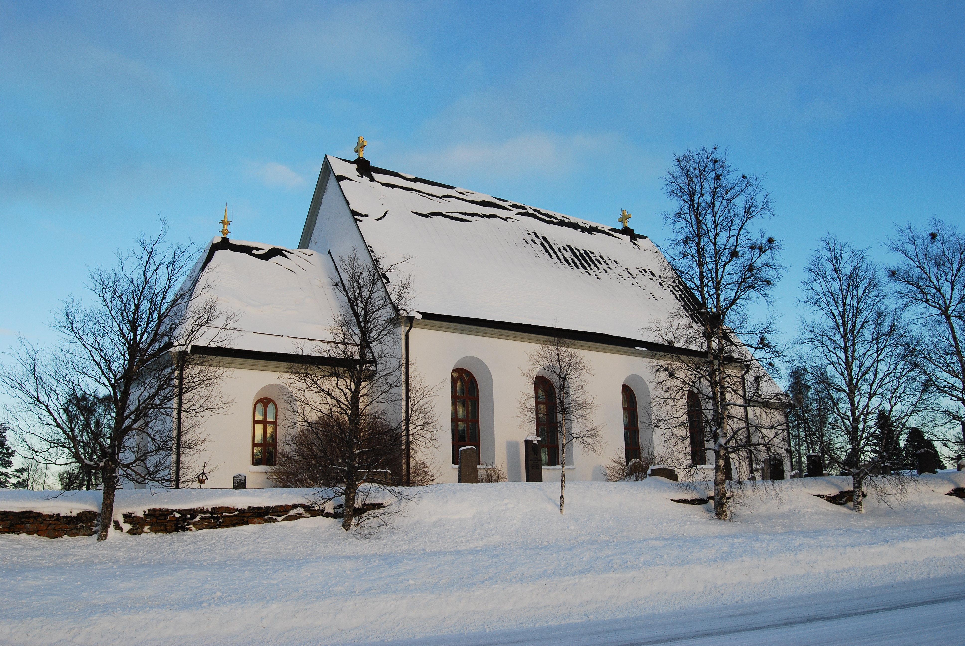 Frösö kyrka, Frösön, Sweden. Side view.